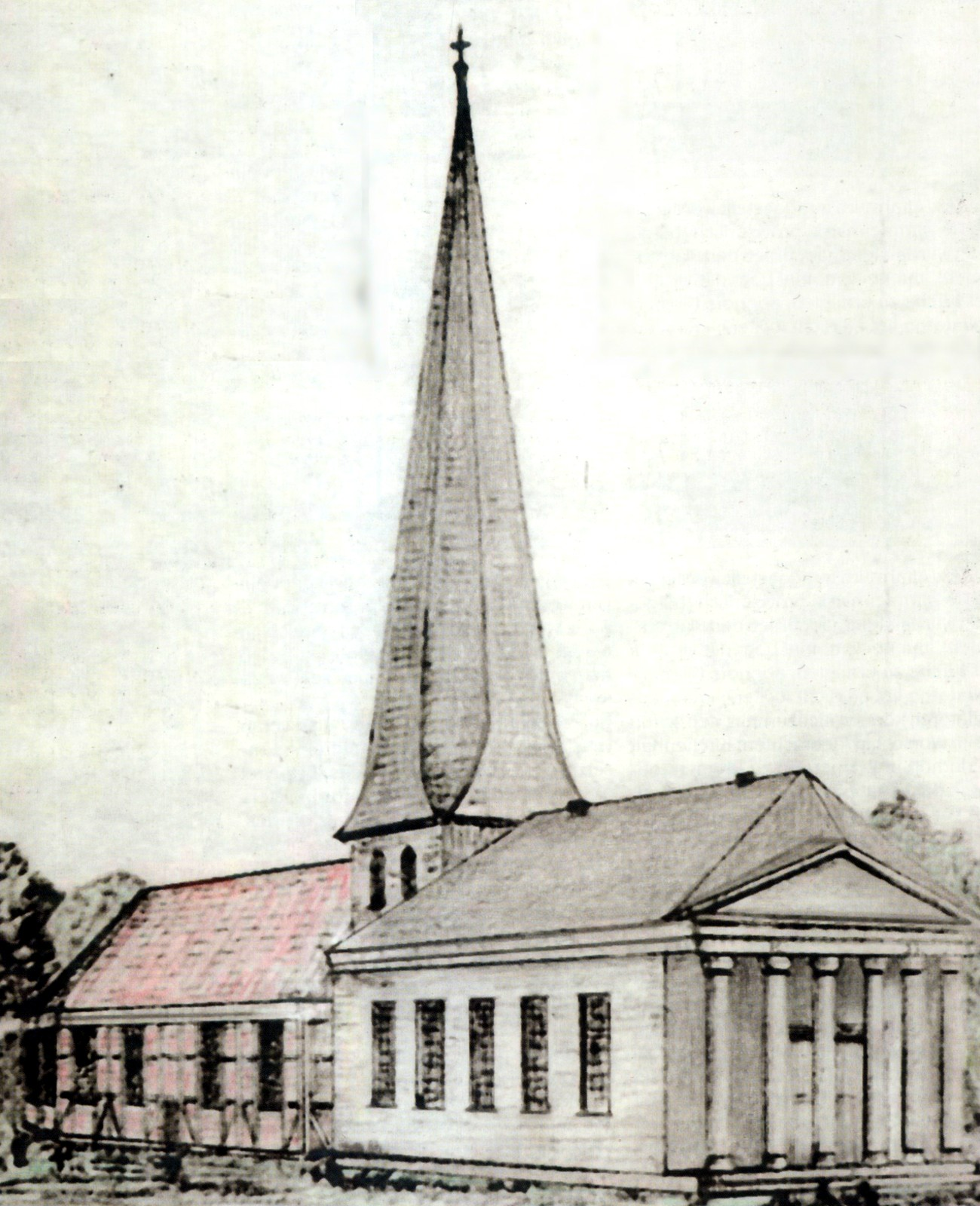 Wandsbeker "Doppelkirche" um 1800, Zeichnung von Amandus Meier, im Hintergrund die alte (1.) Fachwerkkirche von 1634, im Vordergrund der Neubau von 1796, Architekt: Johann August Arens